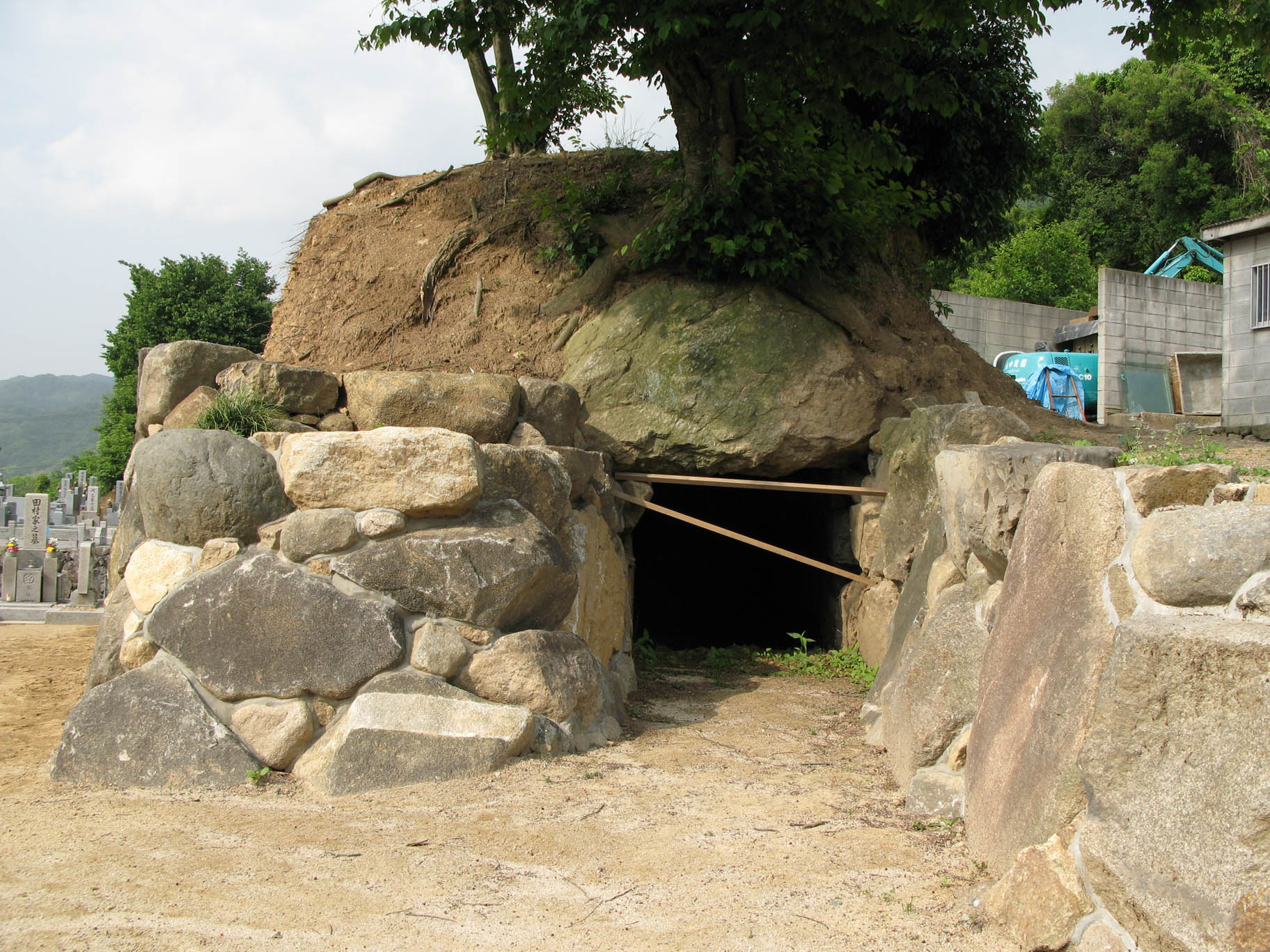 Hattorigawa No.10 kofun in Yao, Osaka, Japan